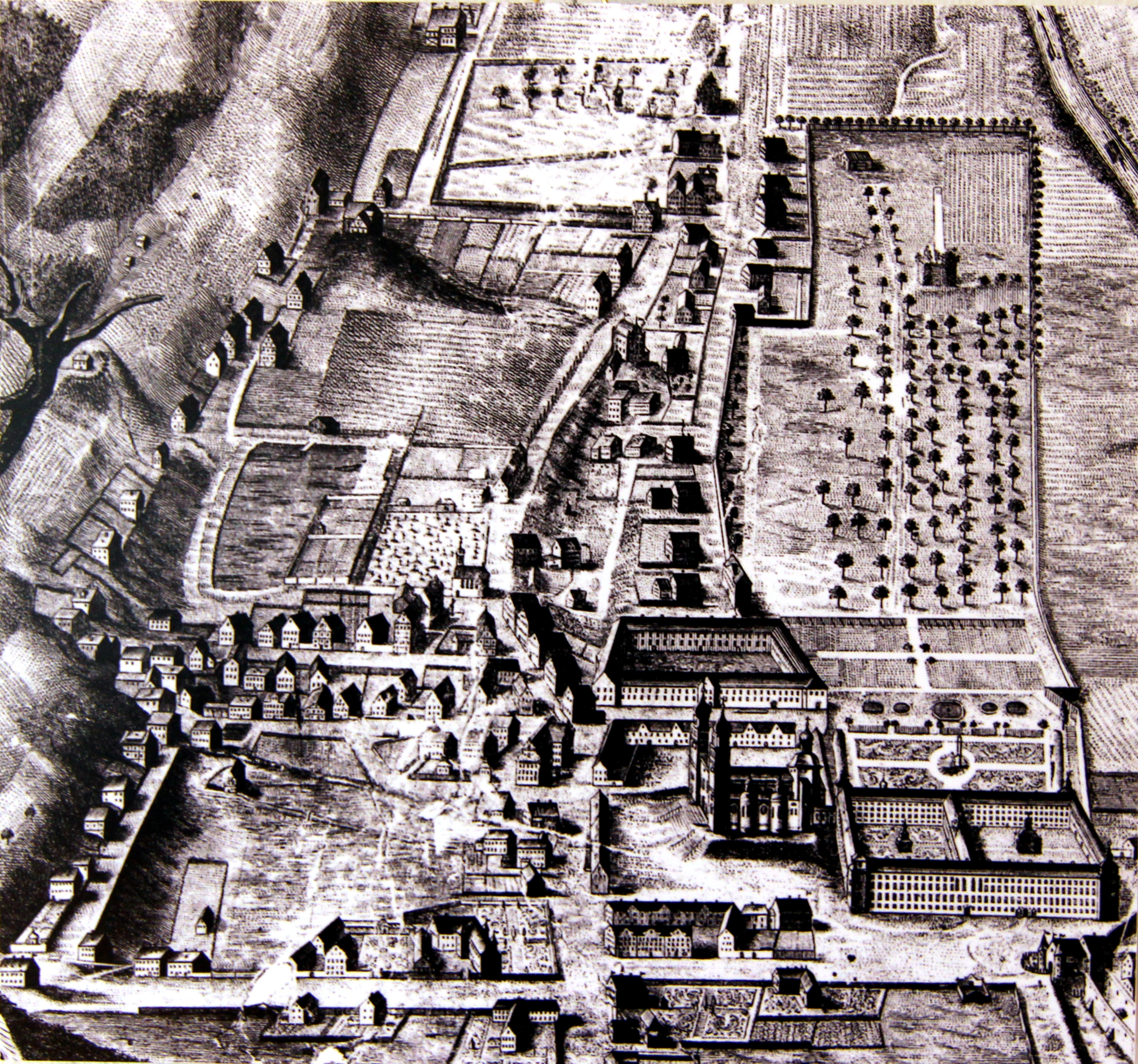 Die Stiftstadt von Kempten, Plan Wahrscheinlich aus dem 17. Jahrhundert.